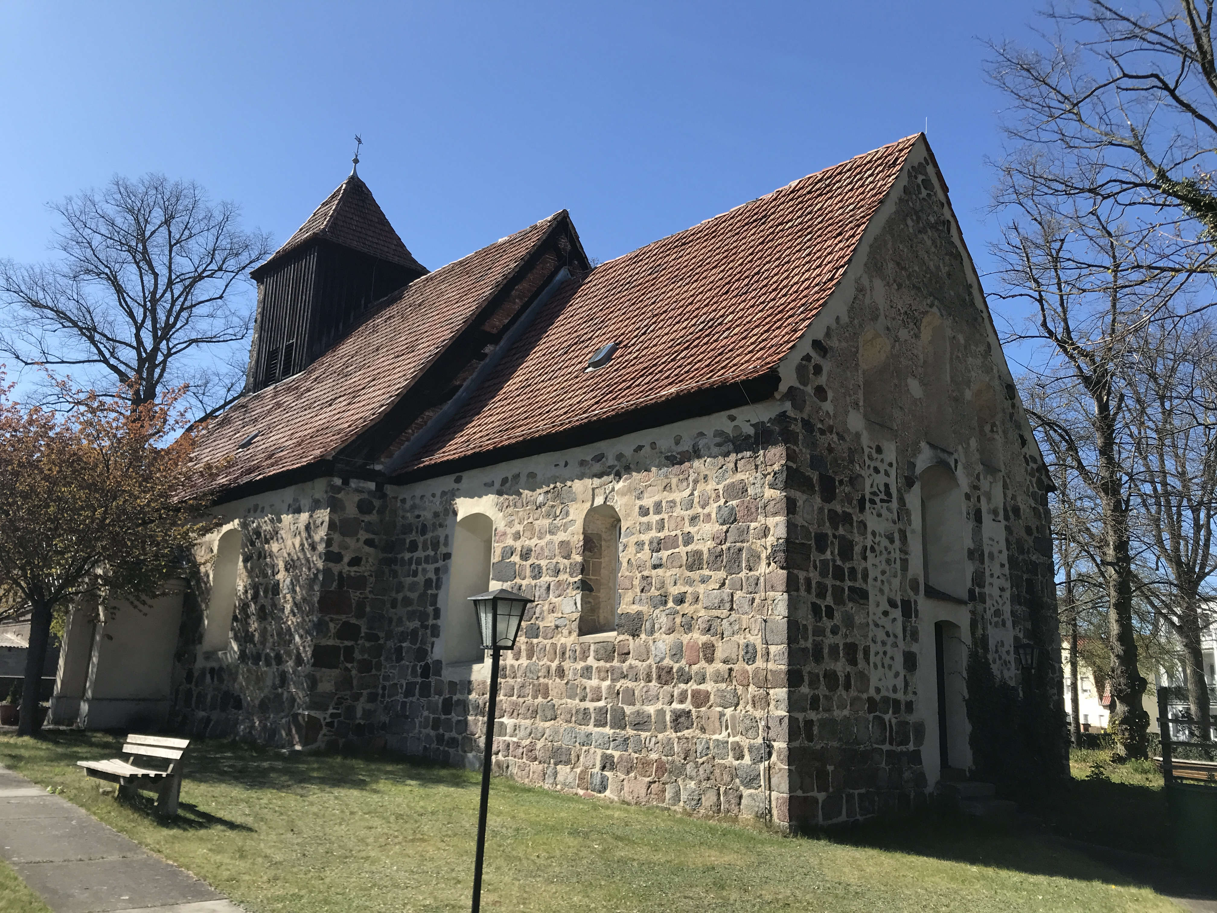 Die Dorfkirche Deutsch Wusterhausen ist eine spätromanische Feldsteinkirche in Deutsch Wusterhausen, einem Ortsteil der Stadt Königs Wusterhausen in Brandenburg. Die Kirchenausstattung stammt im Wesentlichen aus den 1960er Jahren.